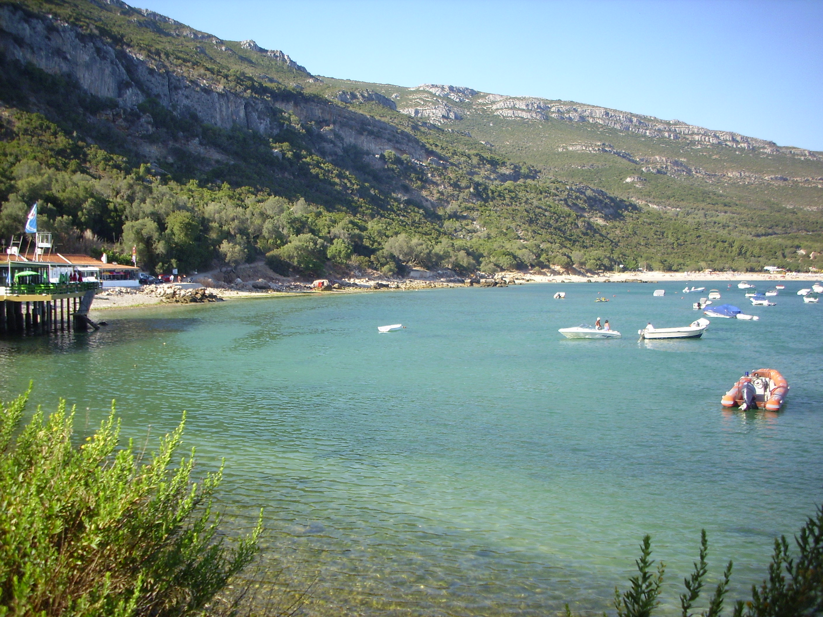 Setúbal